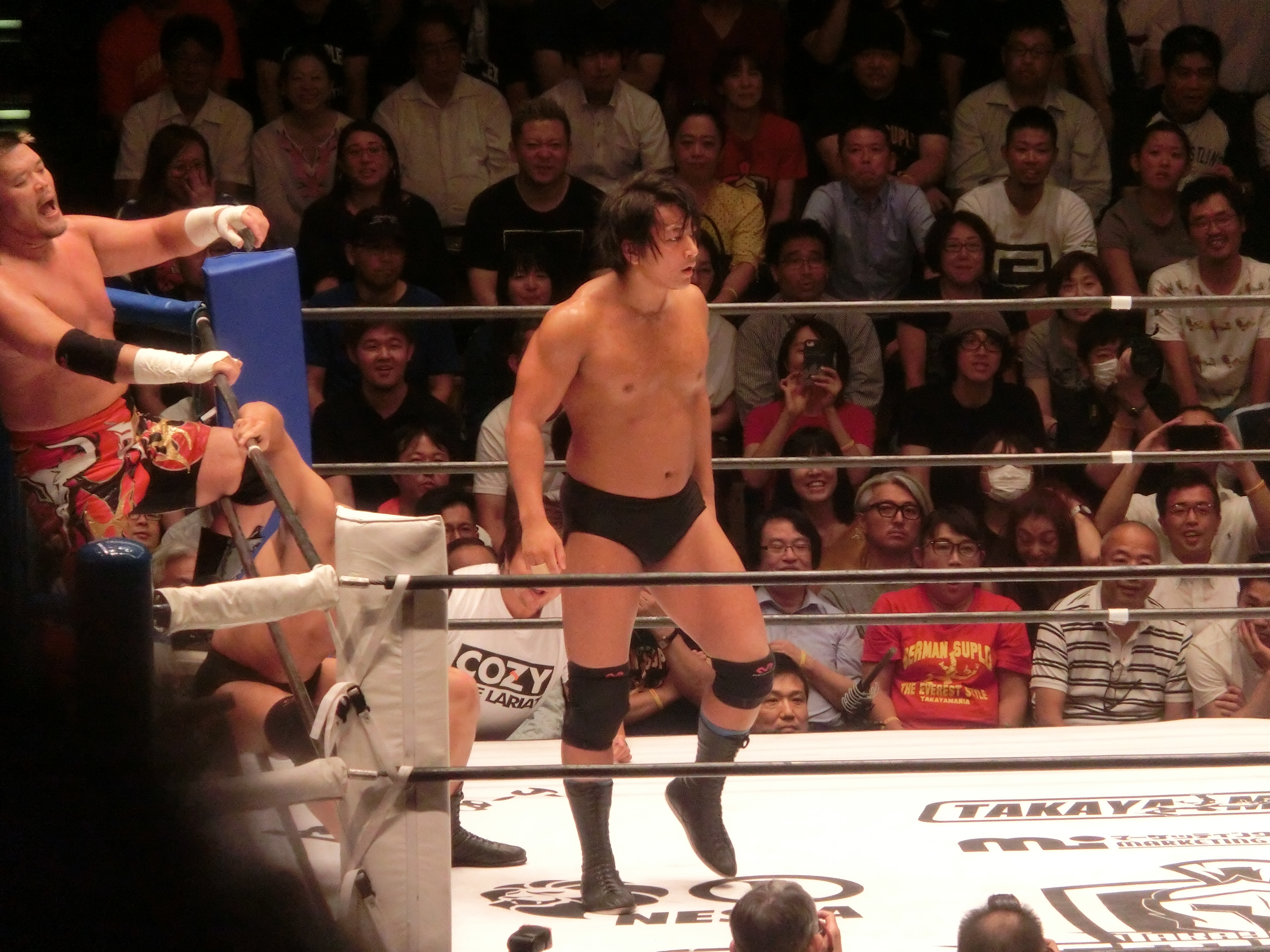 2018年8月31日、後楽園ホール